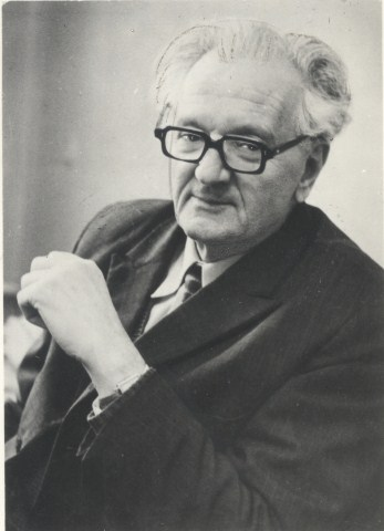 Ковалев Роман Викторович - первый директор Института